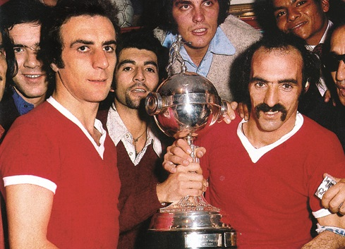 1971. José Omar Pastoriza y Ricardo Elbio Pavoni de Independiente con la Copa Libertadores.